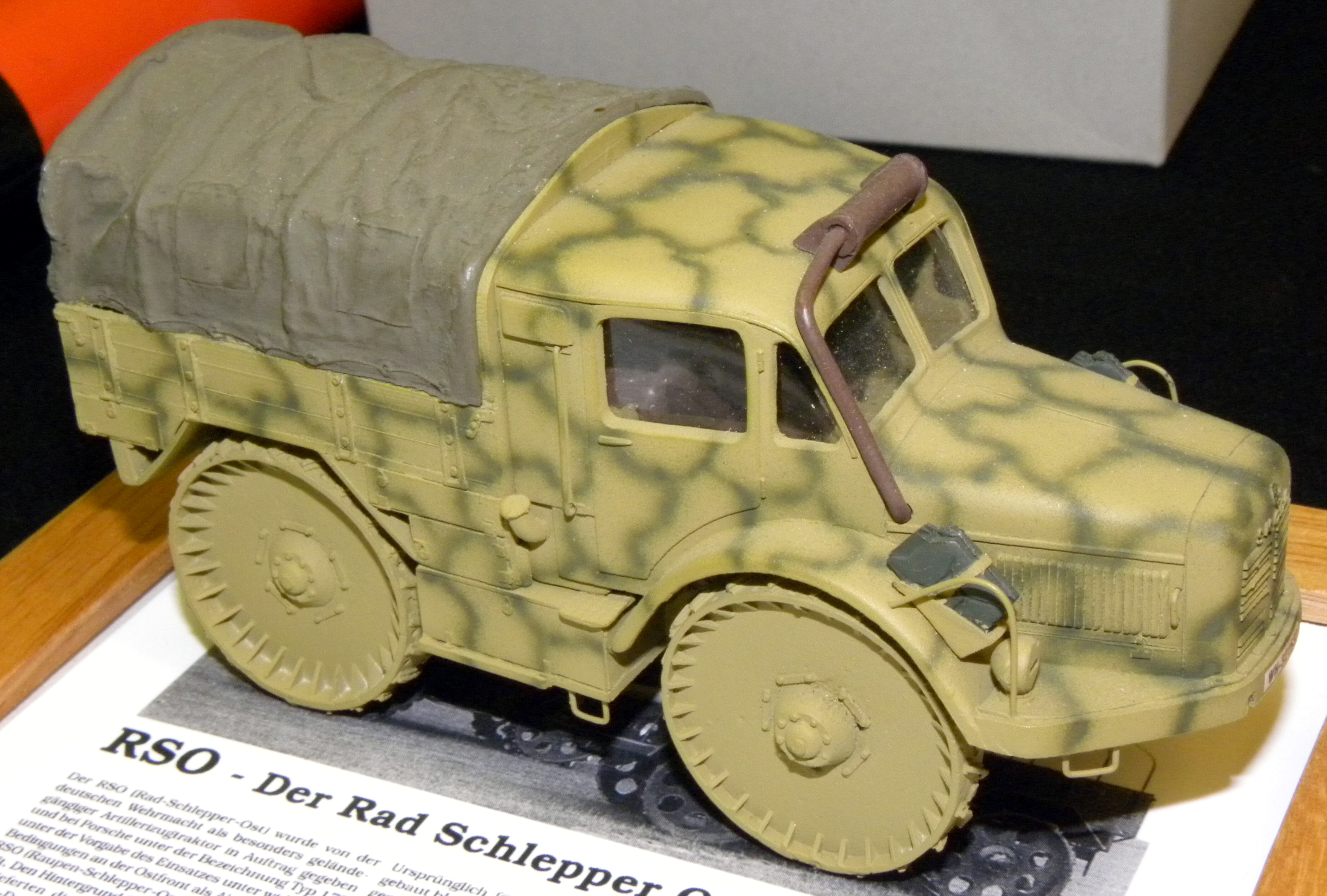 Skoda Rad Schlepper 1944